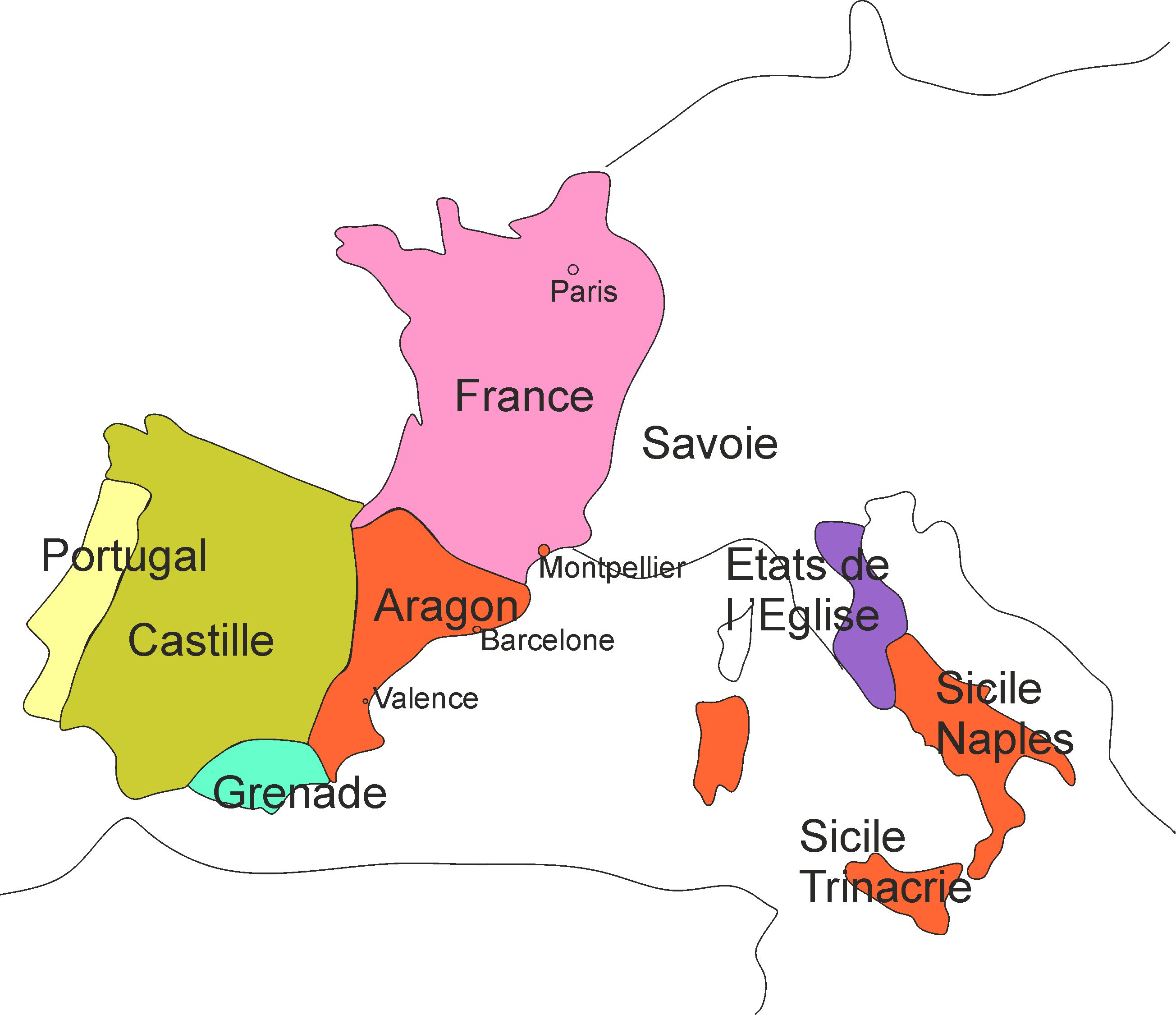 Couronne d'Aragon vers 1300 : royaume d'Aragon, royaume de Sicile